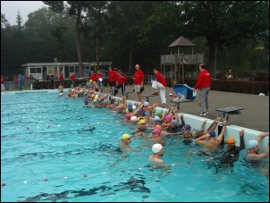 Aquapoldro foto uit clubhistorie